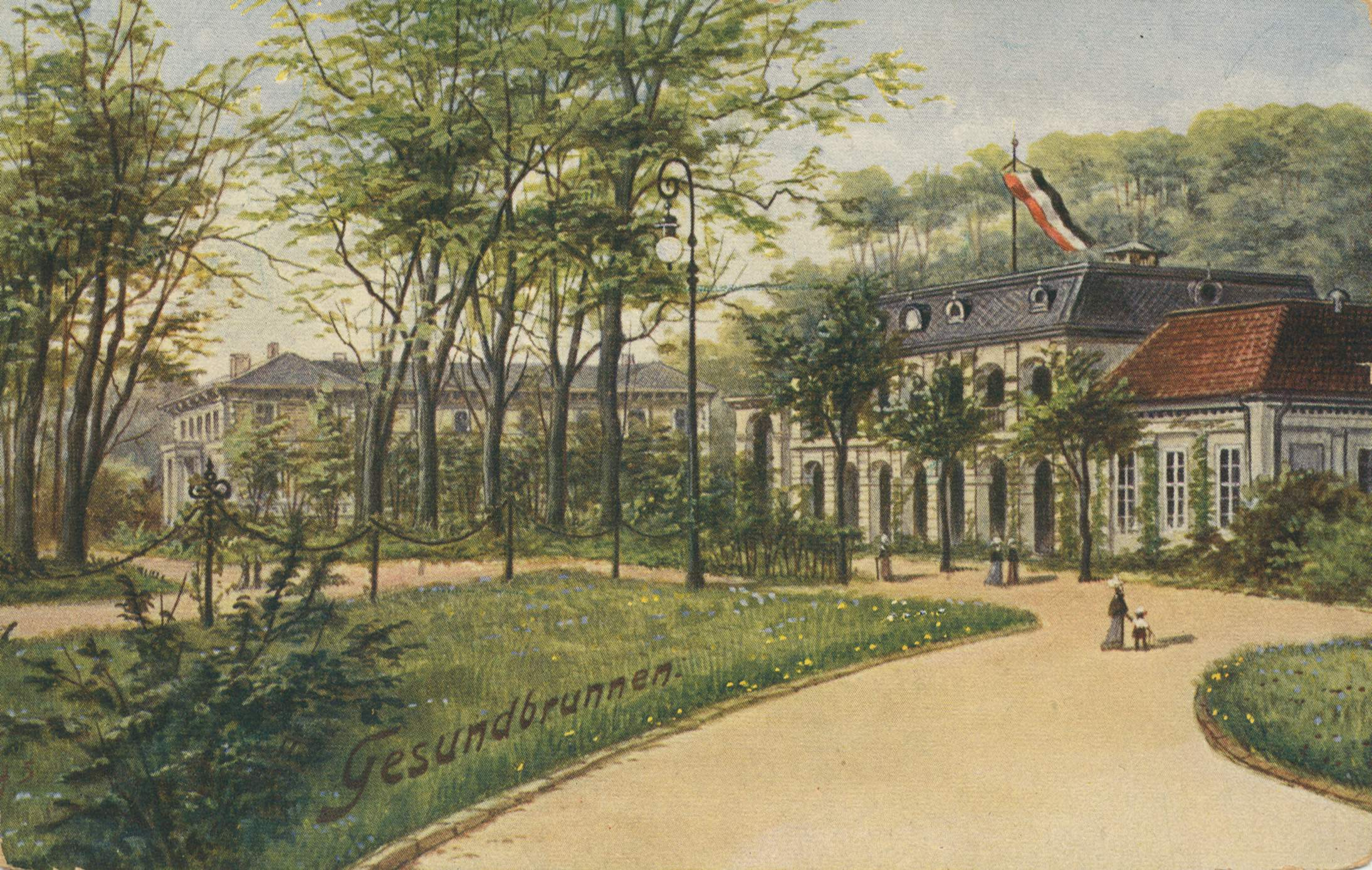 Berlin-Gesundbrunnen